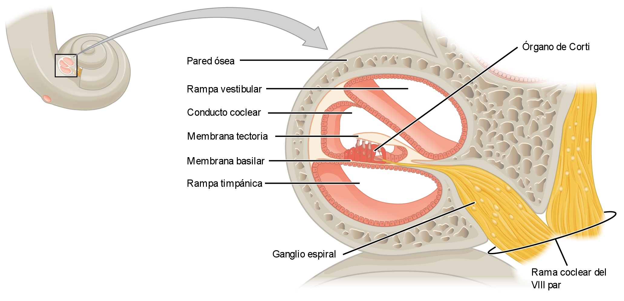 Sección de la cóclea en el oído interno en la que es visible el órgano de Corti.